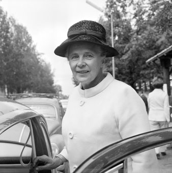 Alva Myrdal på socialdemokraternas valmarknad i Sveaparken i Tierp 1968